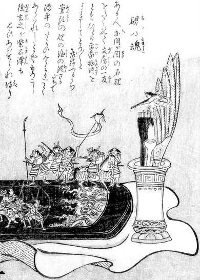 Suzuri-no-tamashī (硯の魂, a Chinese Inkstone tsukumogami) from the Konjaku Hyakki Shūi (今昔百鬼拾遺)